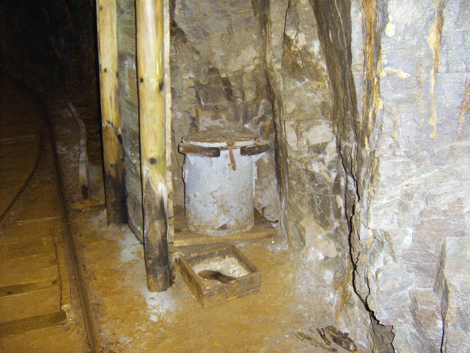 Abortkübel, auch Bergmannsklo genannt. Es ist ein Behälter mit verschließbarem Deckel, in dem die Bergleute Untertage ihre Notdurft verrichten (aufgenommen in der Freiberger Grube "Reiche Zeche").